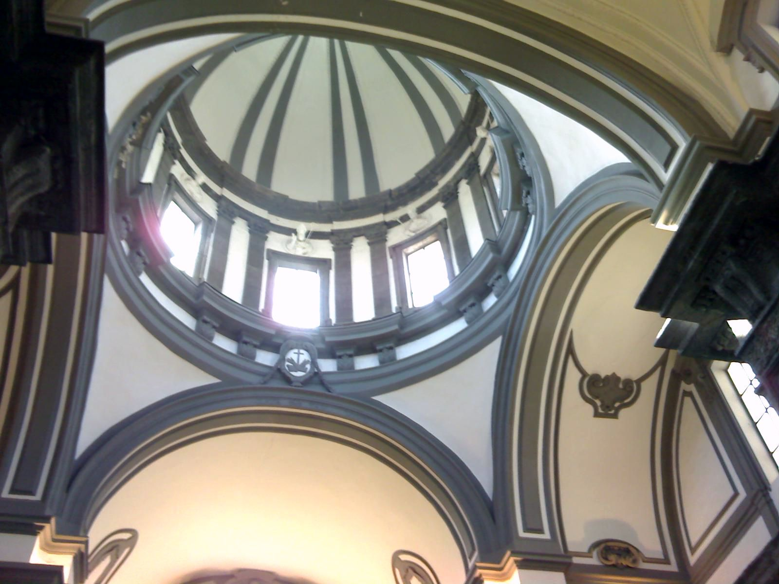 Chiesa di San Severo al Pendino (Napoli) - La cupola vista dall'interno